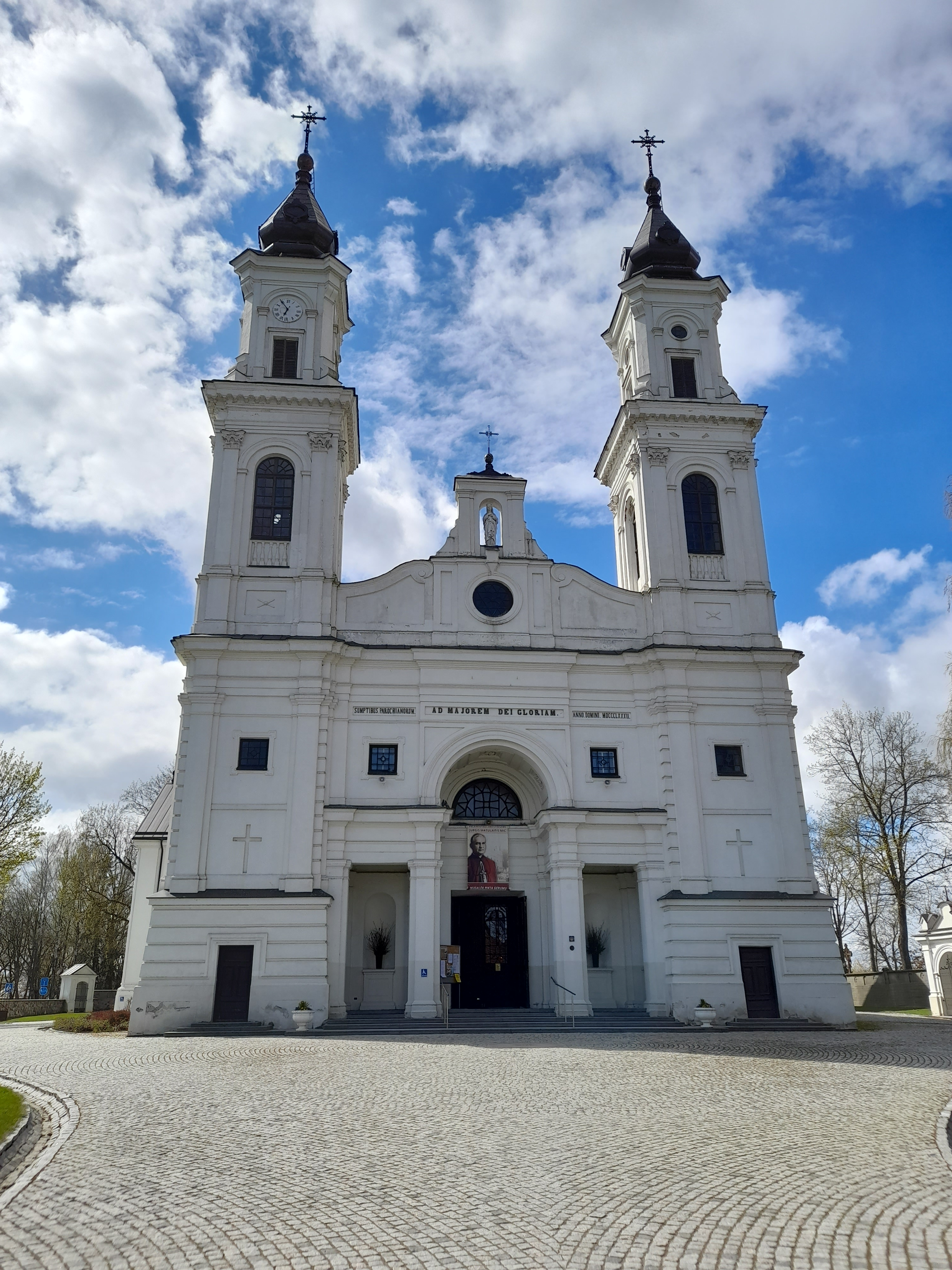 Marijampolės Šv. arkangelo Mykolo mažoji bazilika